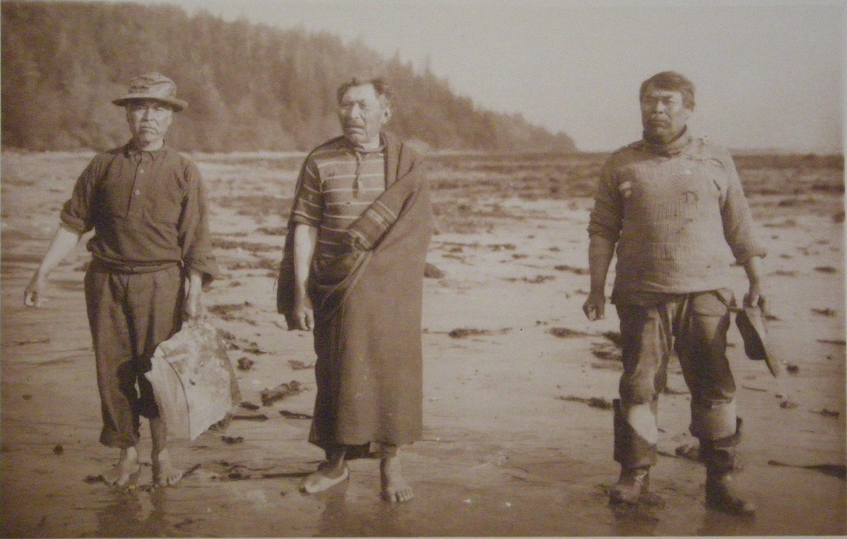 "Makah Indian Whalers".